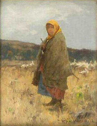 Gęsiarka - Obraz skradziony ok. 2015 z Pałacu Prezydenckiego